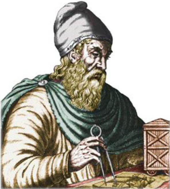 Beschreibung: Archimedes, mittelalterliches Idealportrait aus der deutschen Wikipedia: (Löschen) (Aktuell) 20:40, 2. Dez 2004 . . Bender235 (Diskussion) . . 205 x 245 (20525 Byte) (Link gefunden im Artikel, UHR unklar)